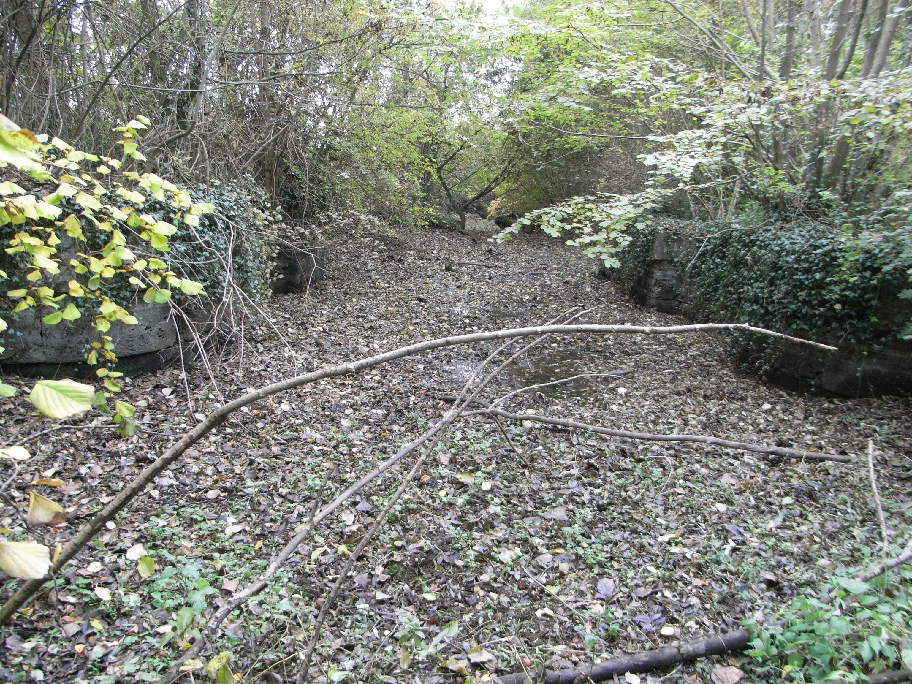 Écluse de Jutigny (77), faisant partie du projet de canal devant relier la Provins à Paris, via la Seine, nommé Canal royal de Provins.